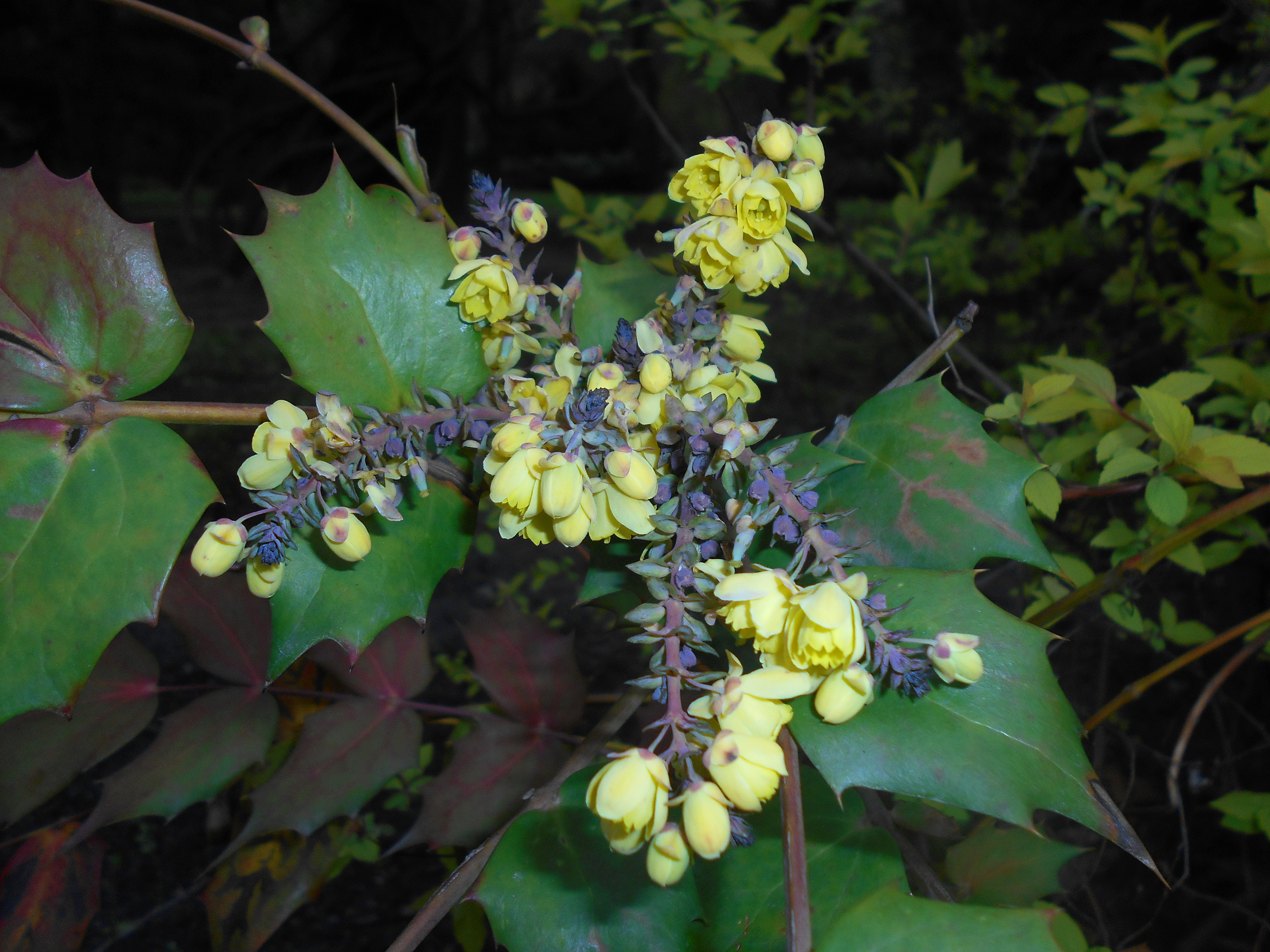 Mahonia bealei, Ogród Botaniczny UMCS w Lublinie